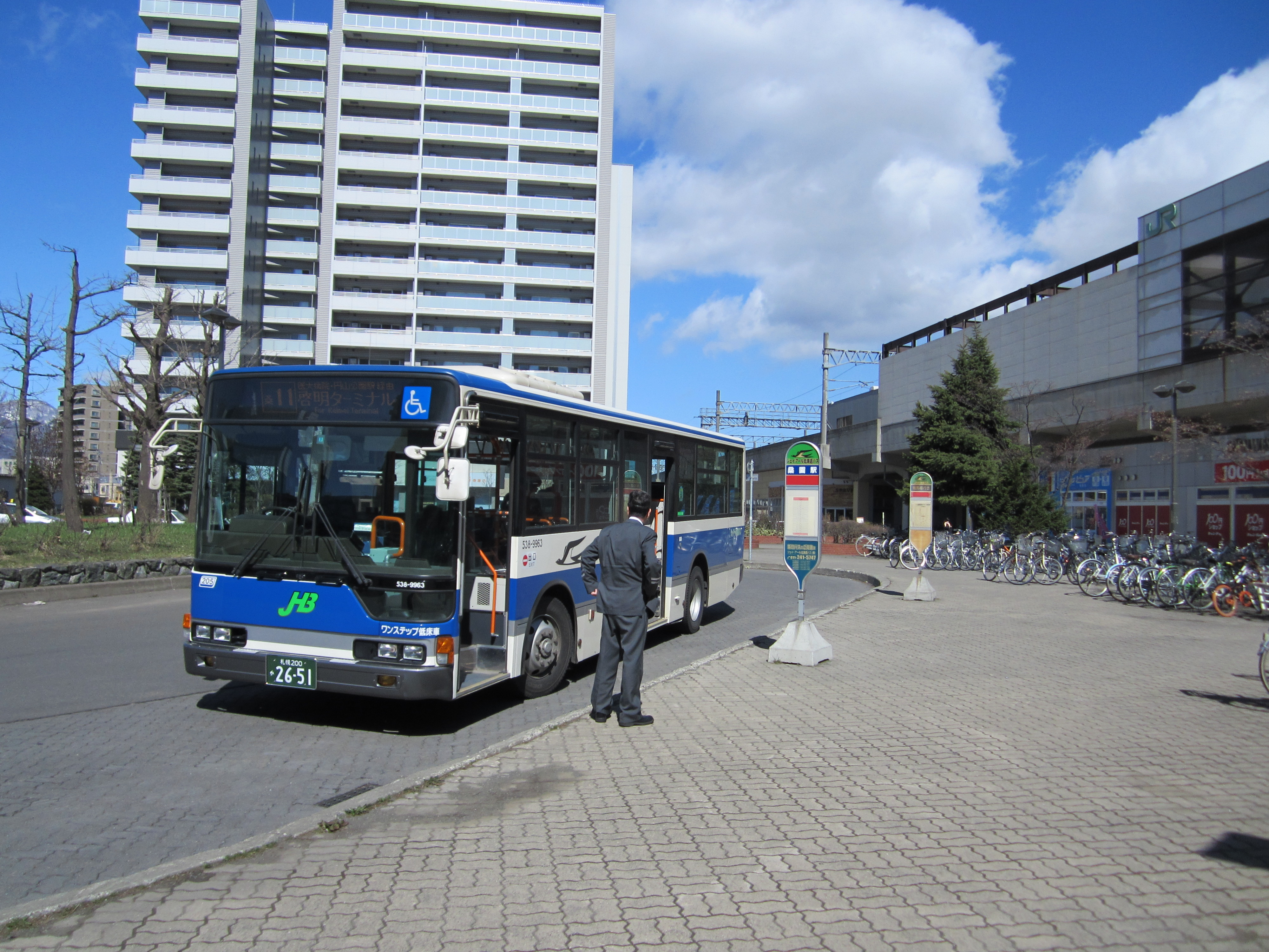 桑園駅前停の様子、発車前の桑11 啓明ターミナル行が見える